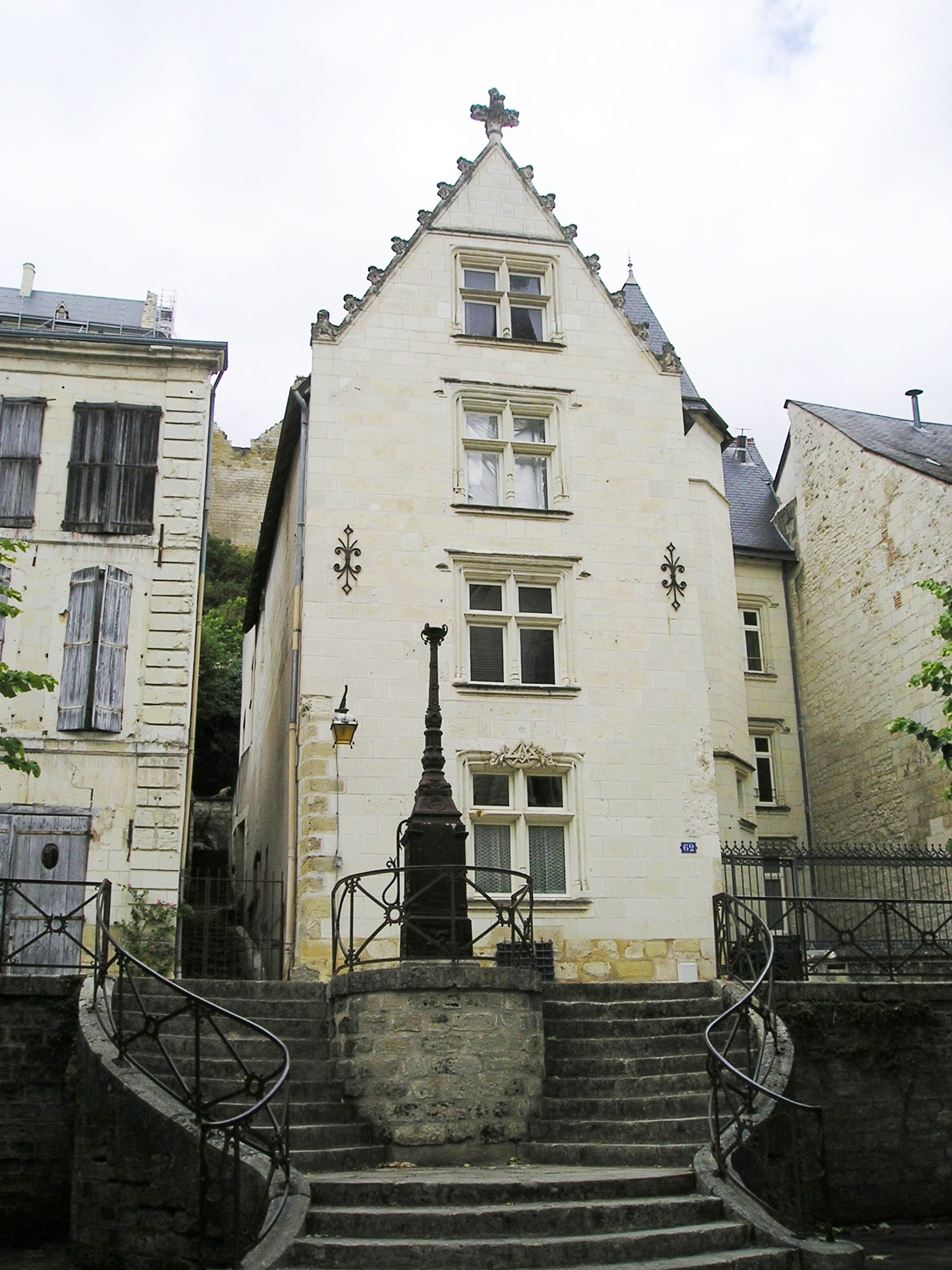 Chinon, Renaissance-Haus in der Altstadt